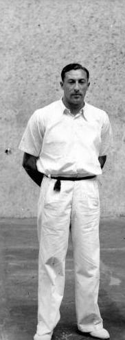 Mariano Lazcano, in 1942